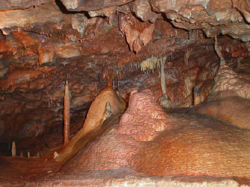 Torquay.